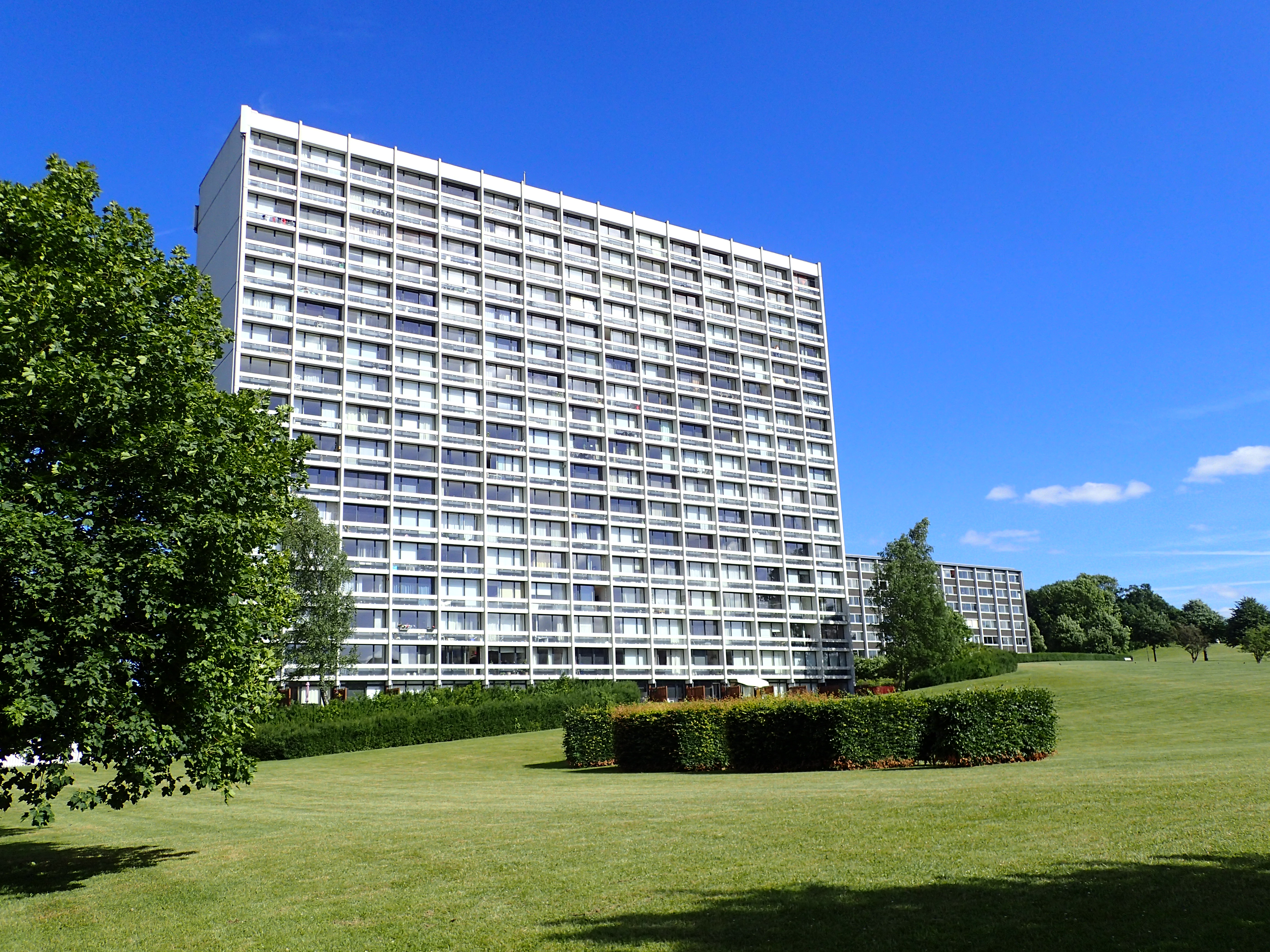 Grøfthøjhuset i Grøfthøjparken.